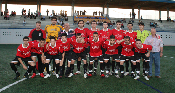 Jugadores del AD Arganda